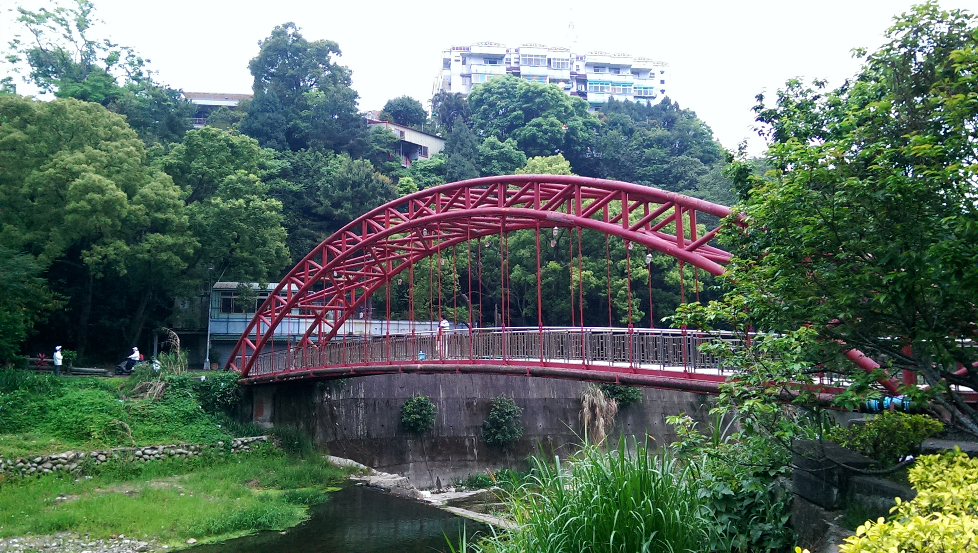 中文（台灣）: 豐原中正公園